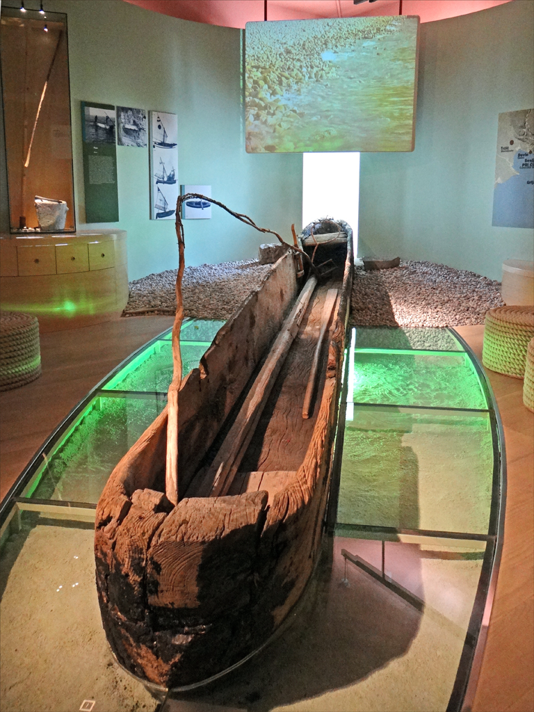 Dernier bateau de pêcheur slovène fabriqué dans un tronc d'arbre (monoxyle) à avoir été utilisé sur la côte adriatique - Karst Le bateau a servi à la pêche jusque dans les années 1930 mais était courant au XIXè siècle dans cette partie de la côte. Le musée d'ethnographie slovène se trouve dans l'ancien quartier militaire de Metelkova, à coté d'un musée d'art contemporain, d'un musée d'arts décoratifs et d'une cinémathèque. Le bâtiment moderne a été construit dans les années 2000 en intégrant une caserne avec un grand talent architectural. Le bâtiment et les aménagements ont été réalisés avec le soutien de l'Union européenne. Le musée présente des expositions temporaires et une exposition permanente consacrée aux arts et traditions populaires slovènes essentiellement rurales (objets domestiques, vêtements, architecture rurale, outils, poteries, bateau, instruments de musique, masques et déguisements, archives multiples, etc. Les conservateurs du musée se sont fortement inspirés, en la modernisant, de la scénographie de l'ancien musée français des arts et traditions populaires situé dans le bois de Boulogne à Paris et qui est aujourd'hui fermé. La scénographie est classique, sans innovations majeures, elle propose de nombreux postes multimédias, quelques espaces, conçus par des artistes sont plus attractifs. Les espaces pour les enfants sont nombreux et bien faits. Une partie de l'exposition permanente est consacrée aux cultures du monde (Asie, Afrique, Océanie, Amérique) mais les objets exposés sont en tout petit nombre et l'approche reste très sommaire. Ces salles sont vraisemblablement destinée prioritairement aux scolaires. Devant le musée était présentée en juillet 2013 une remarquable exposition de photographies consacrées aux rites de l'Inde et de l'Afrique . Site du musée .